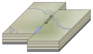 Autor: Usuario:Luis María Benítez